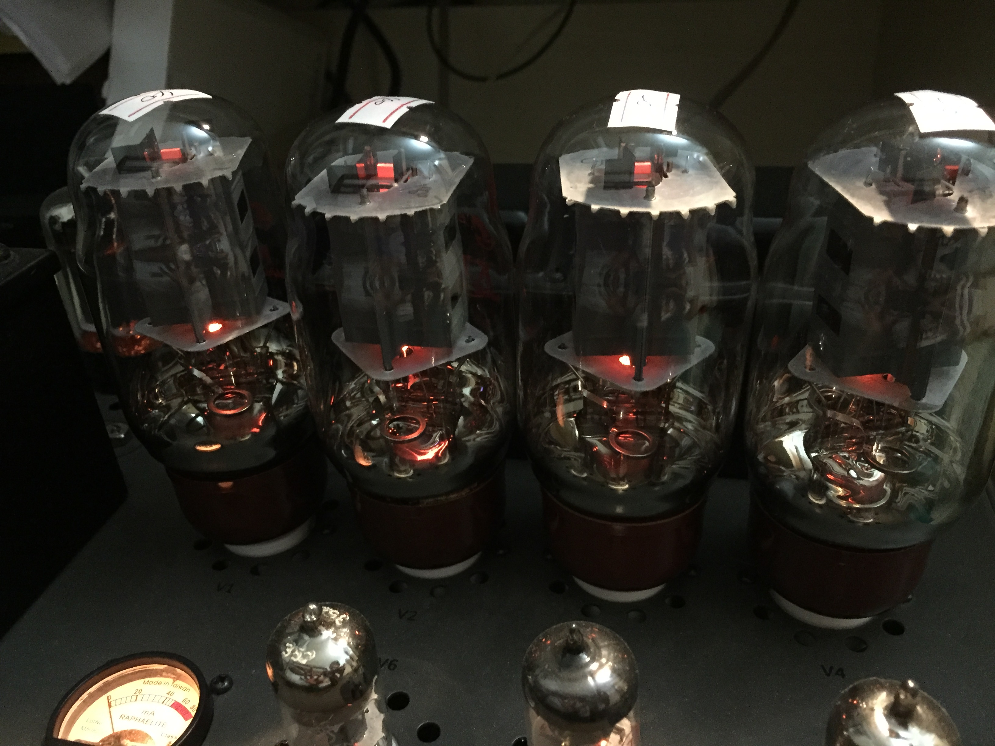 曙光生产的KT66